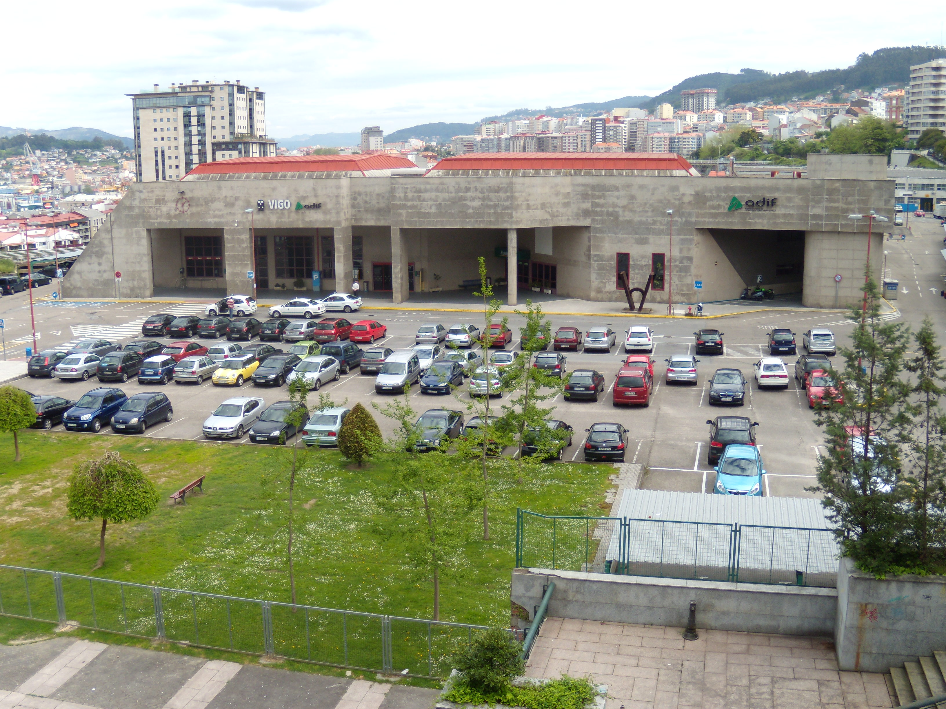 Estación de tren de Vigo antes de ser demolida con motivo de la llegada del AVE a la ciudad olívica